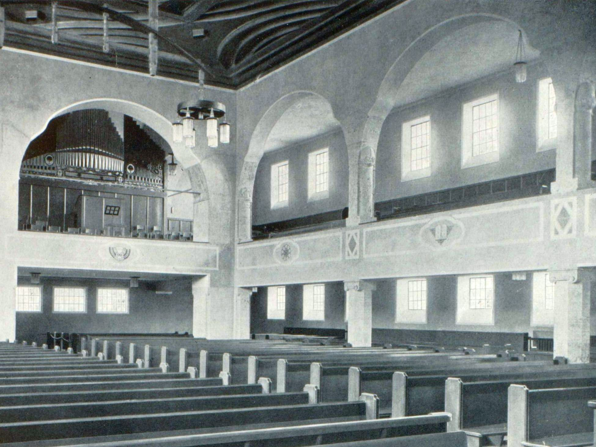 Erlöserkirche Stuttgart, Hauptschiff mit Blick zur Orgelempore und zur Seitenempore, 1909.